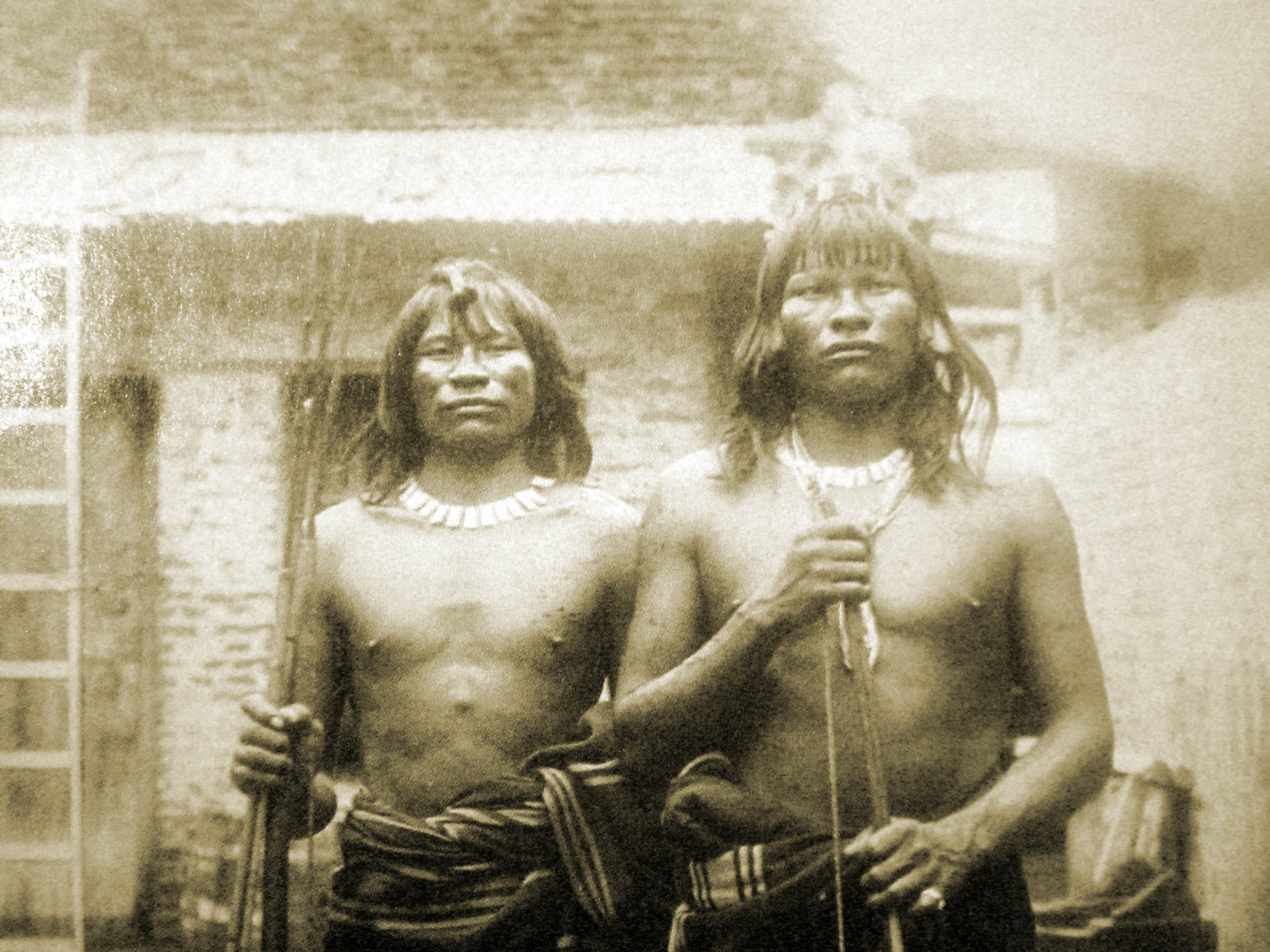 Cacique Pucú, indios lenguas, Chaco